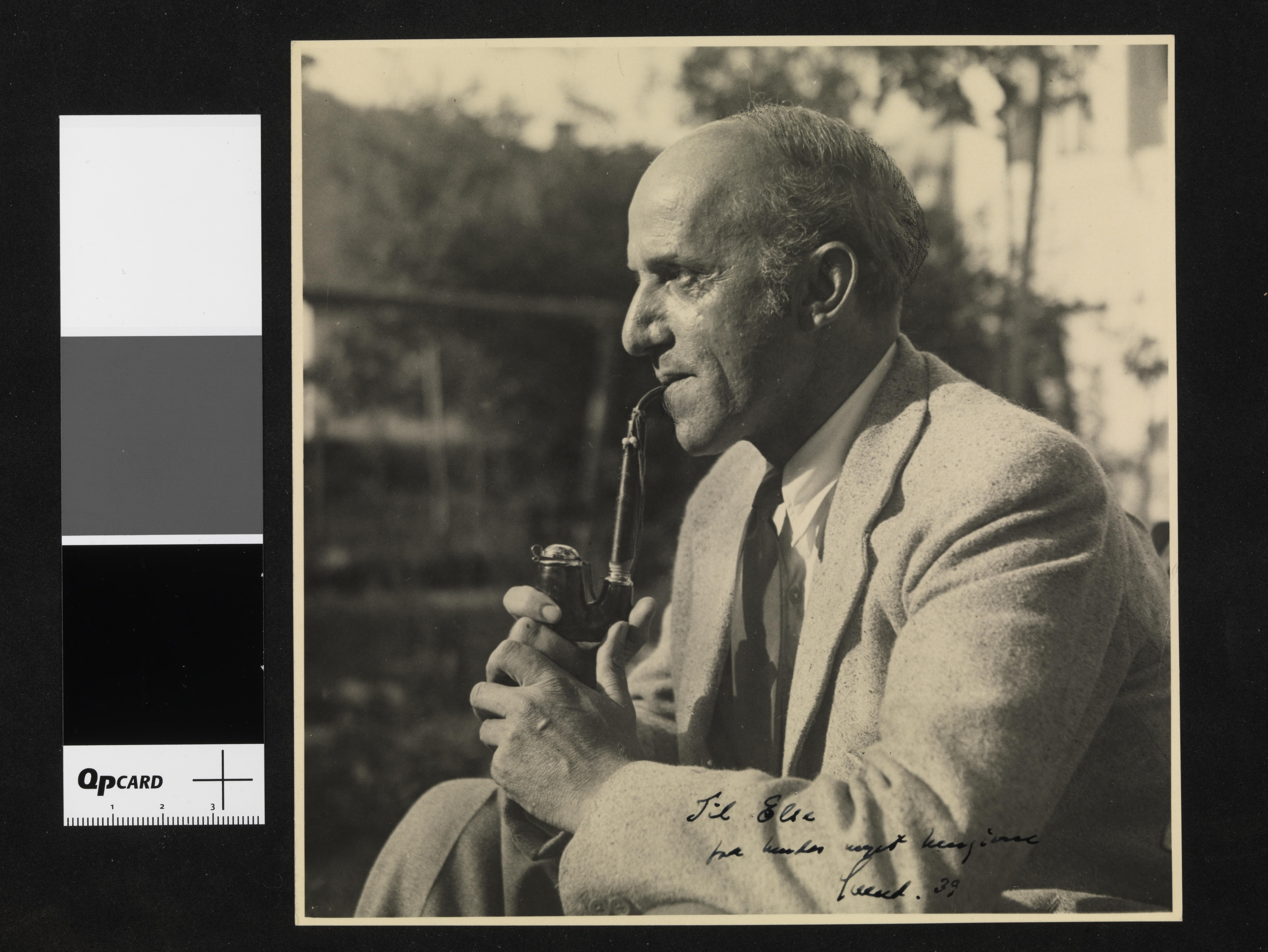 Bildet er hentet fra Nasjonalbibliotekets bildesamling Depicted person: Borberg, Svend